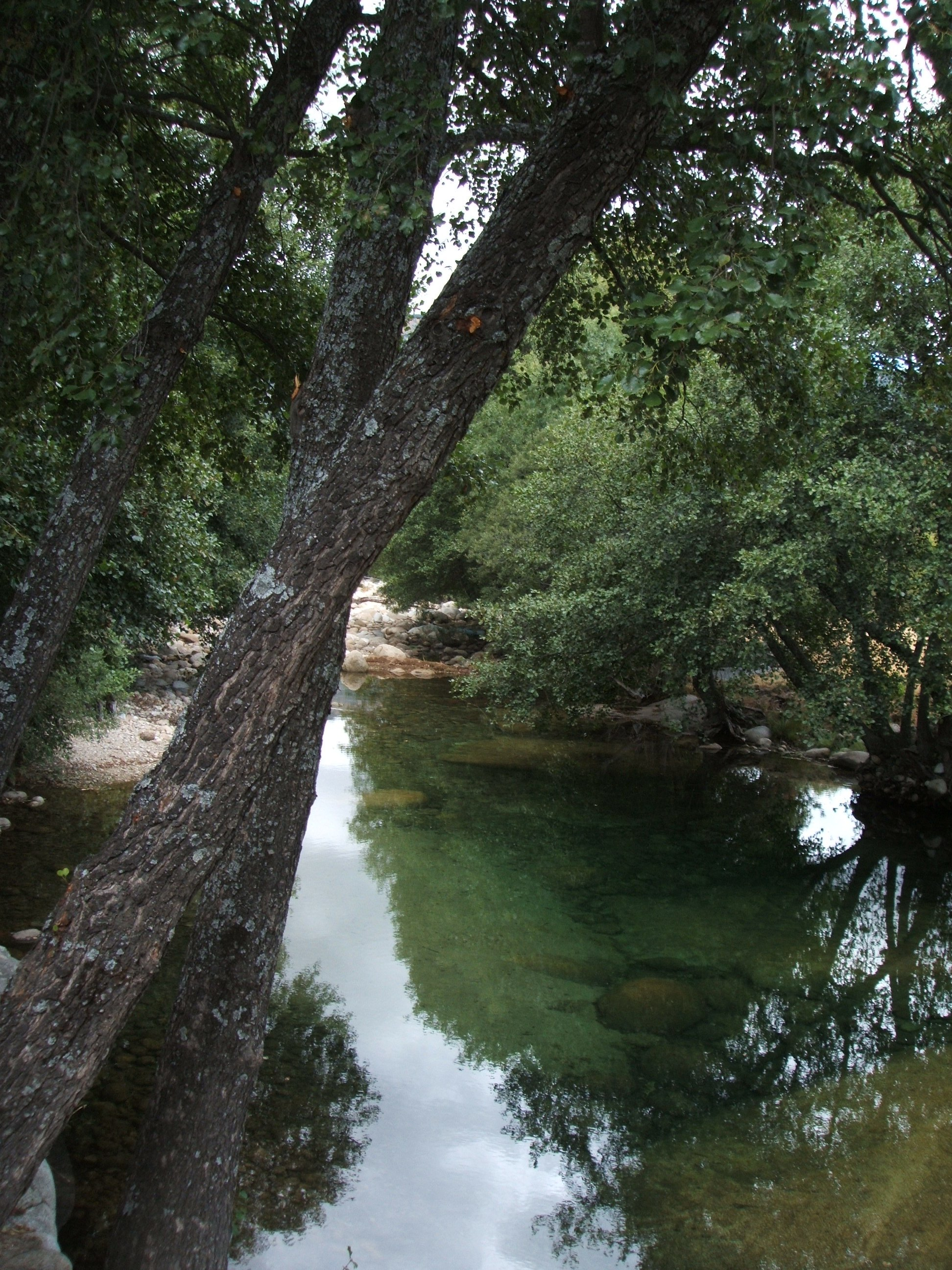 Garganta de Bohoyo(Ávila, España). AUTOR: Alfredo (con permiso del autor)